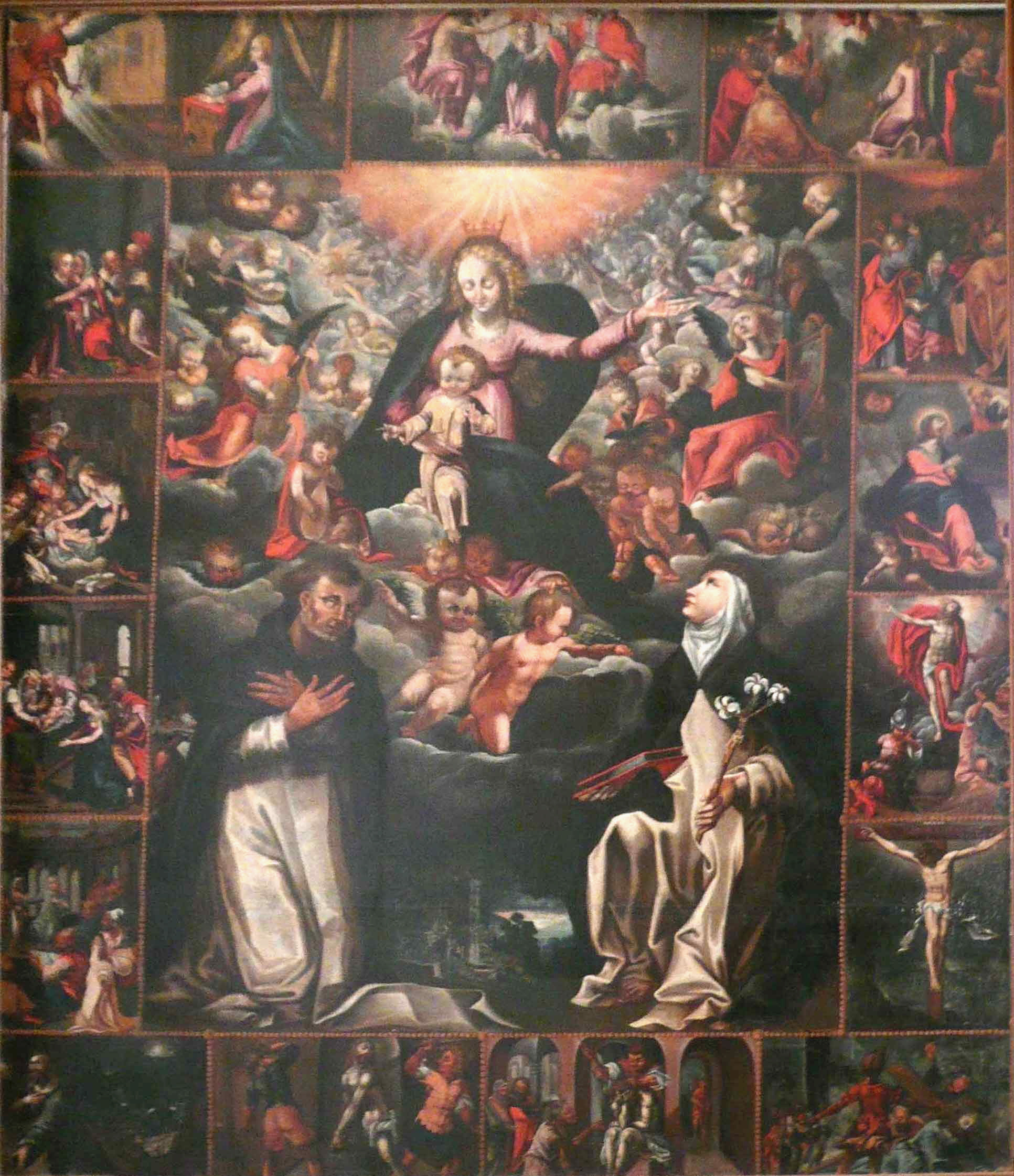 Tableau du XVII° siècle représentant une Madone du Rosaire dans la collégiale de Six-Fours.